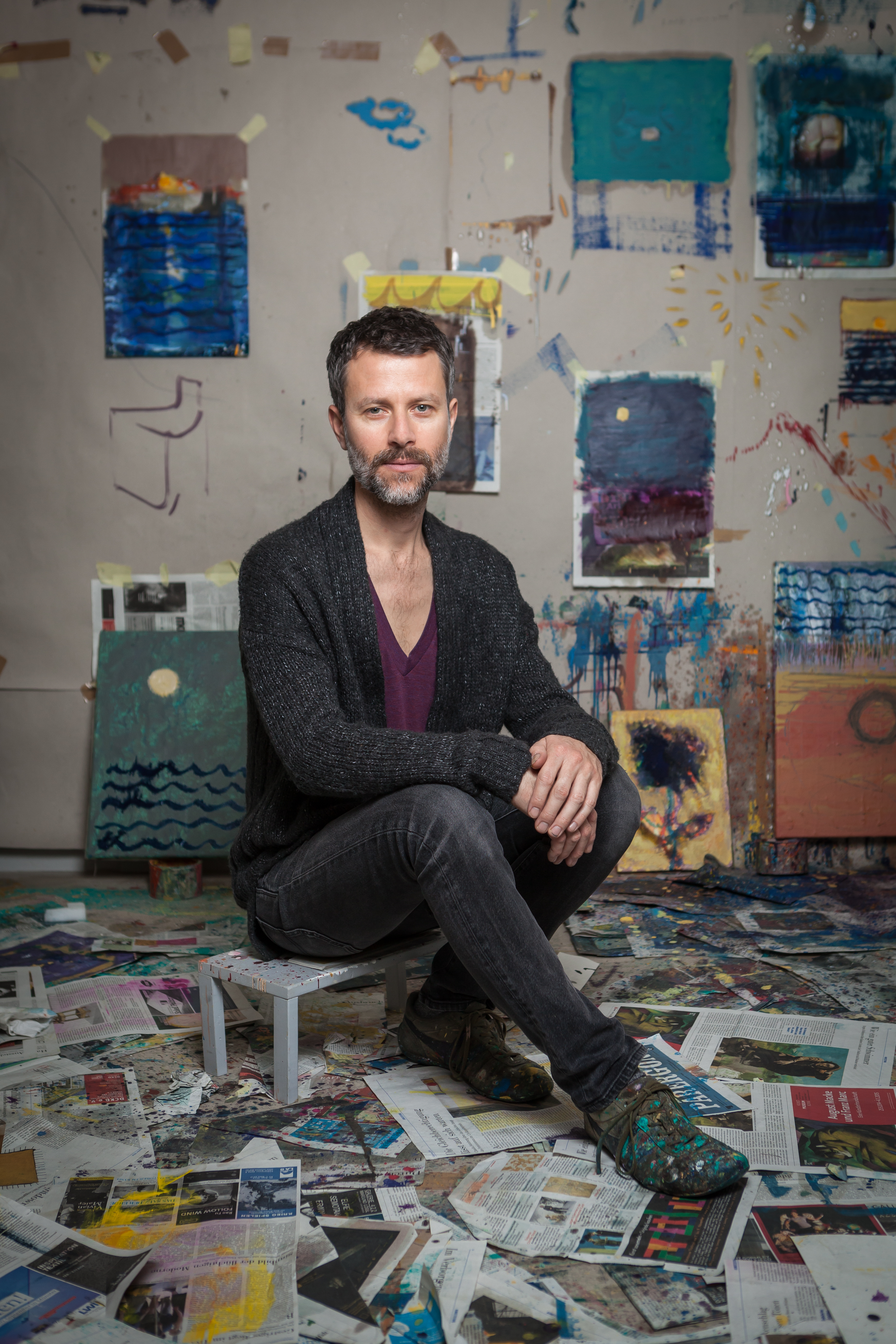 אולף קונמן הוא צייר ישראלי-גרמני, זוכה פרס ישראכרט ומוזיאון תל אביב לאמנות לשנת 2008